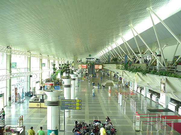 Aeroporto Internacional de Belém, Pará, Brazil